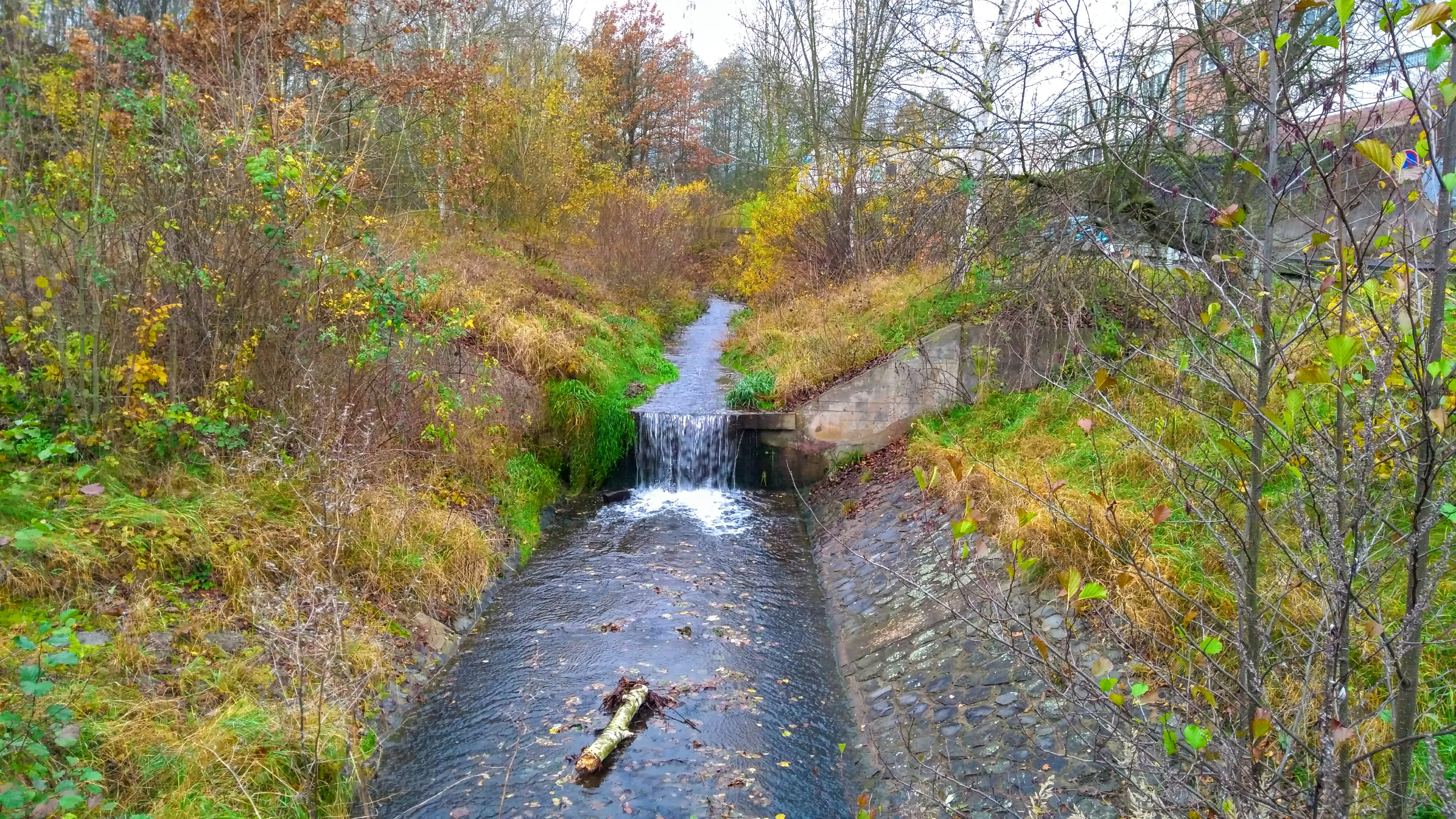 Potok.